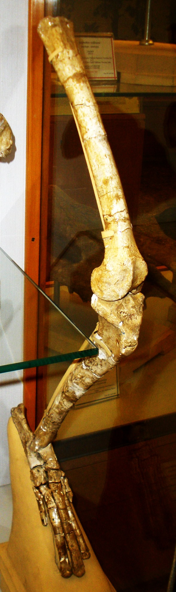 Fossil of Acinonyx pardinensis, an extinct mammal - Took the picture at Museo Paleontologico di Firenze